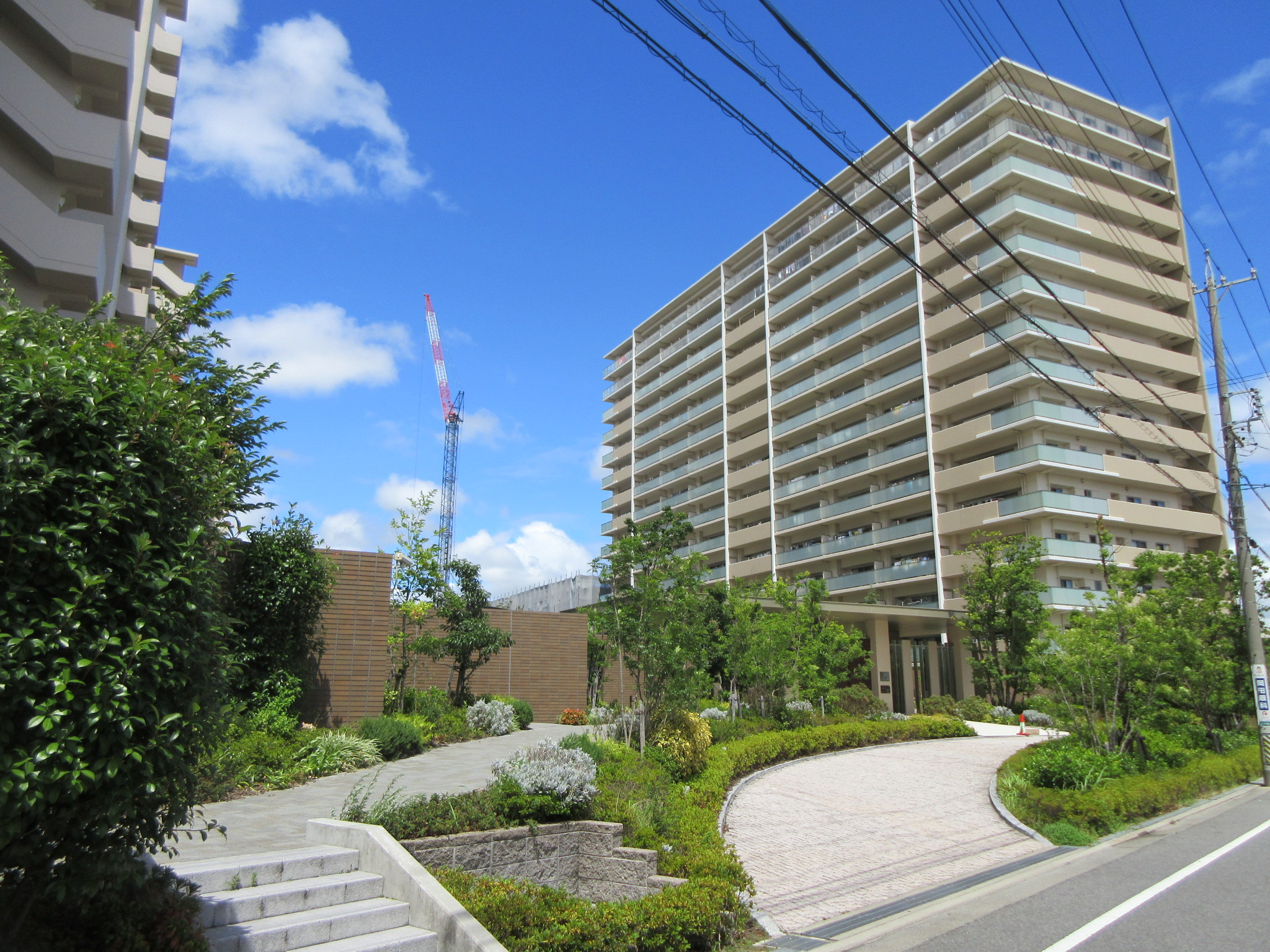 岡崎市上六名3丁目、万有製薬岡崎工場跡